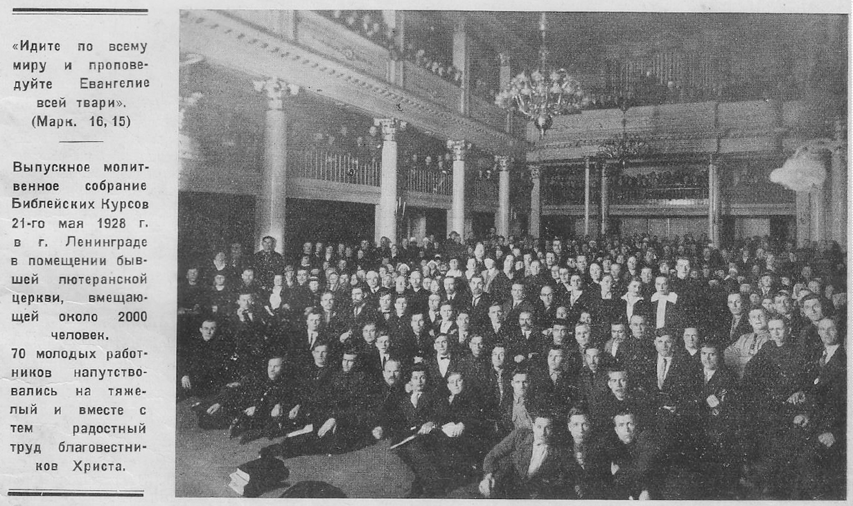 Выпускное собрание Ленинградских библейских курсов, 1928 год. В центре - Иван Проханов